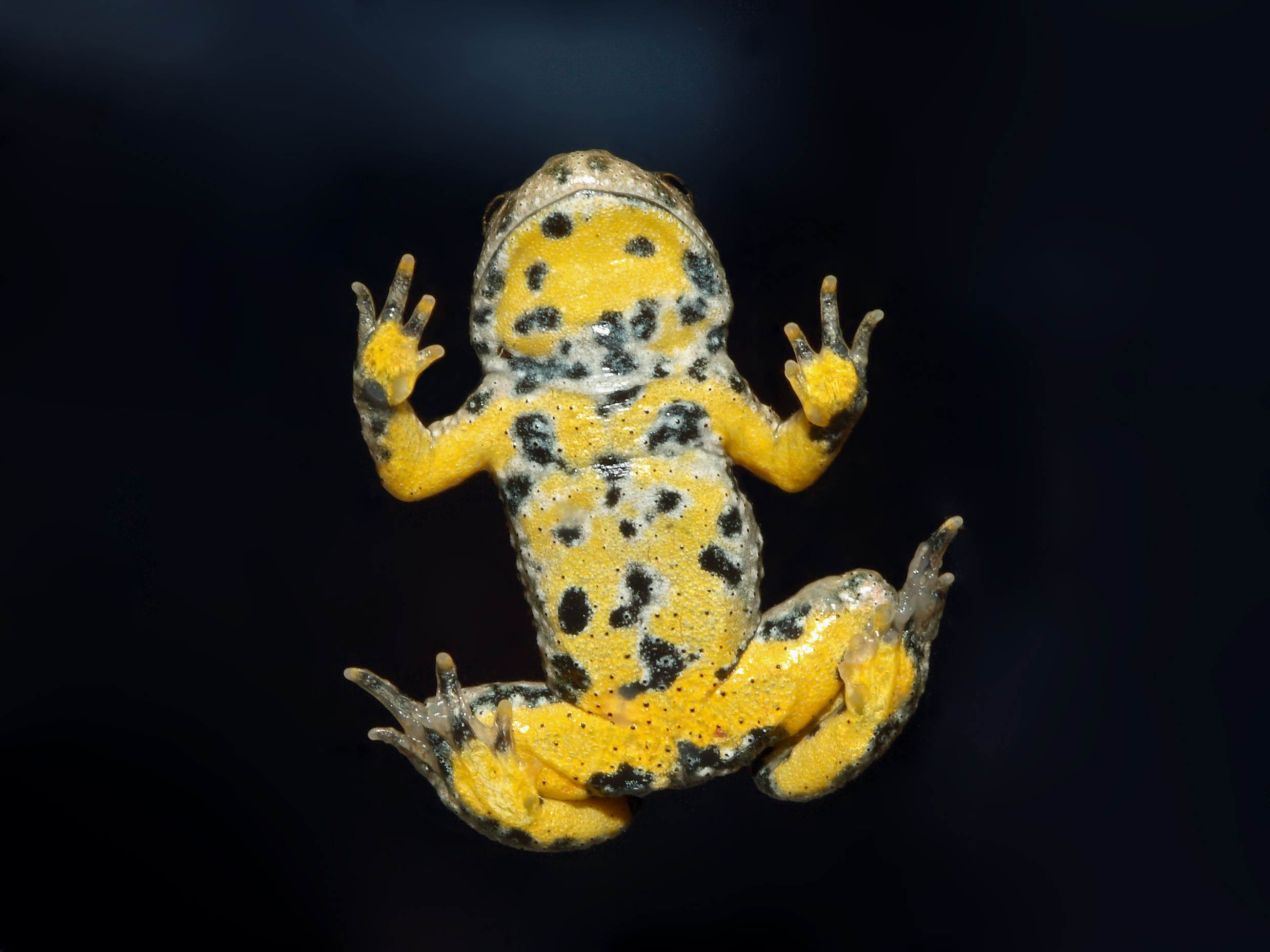 Bombina variegata (ventral side) - Gelbbauchunke (Unterseite)